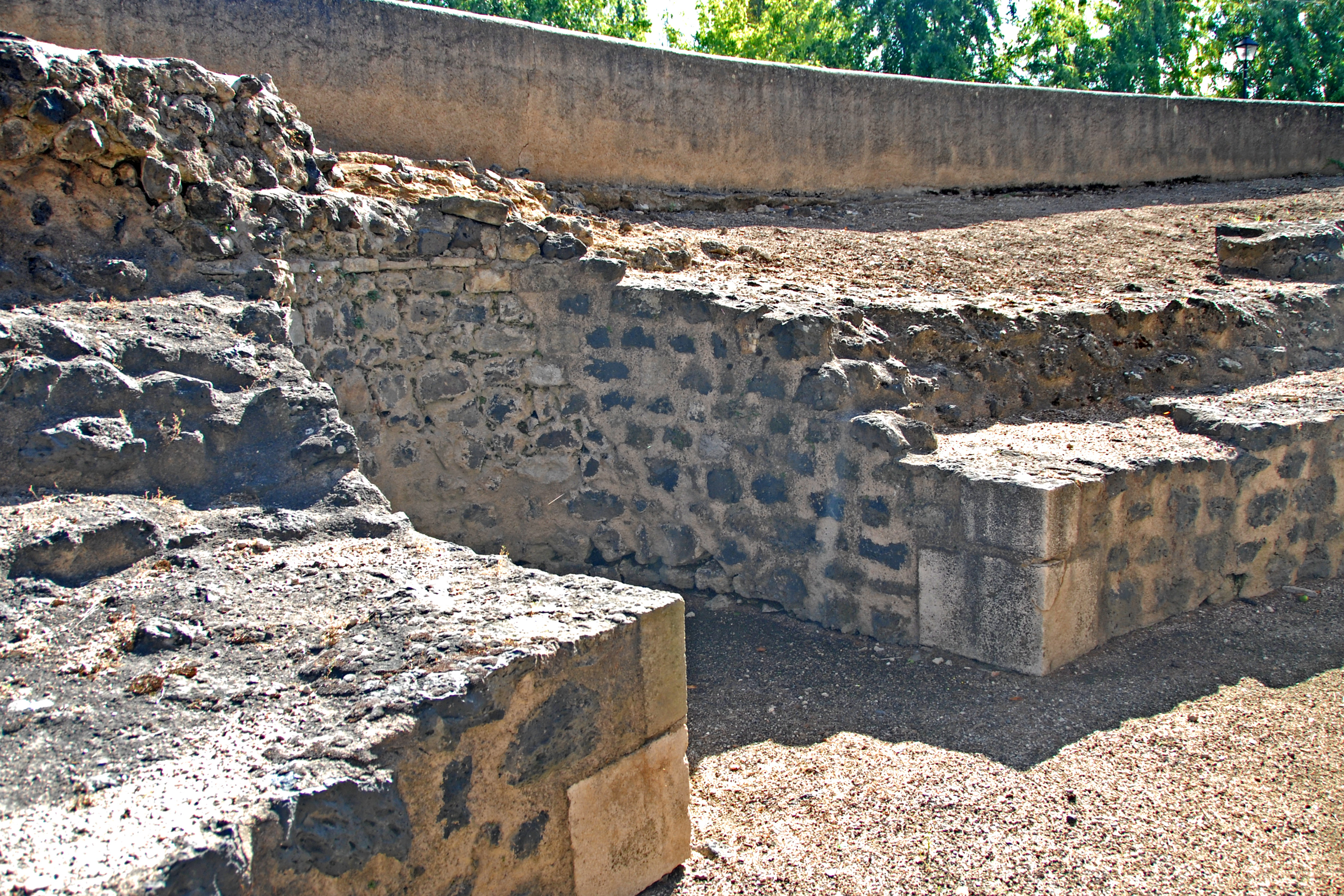 Mozat, Krypta, Umgangskapelle